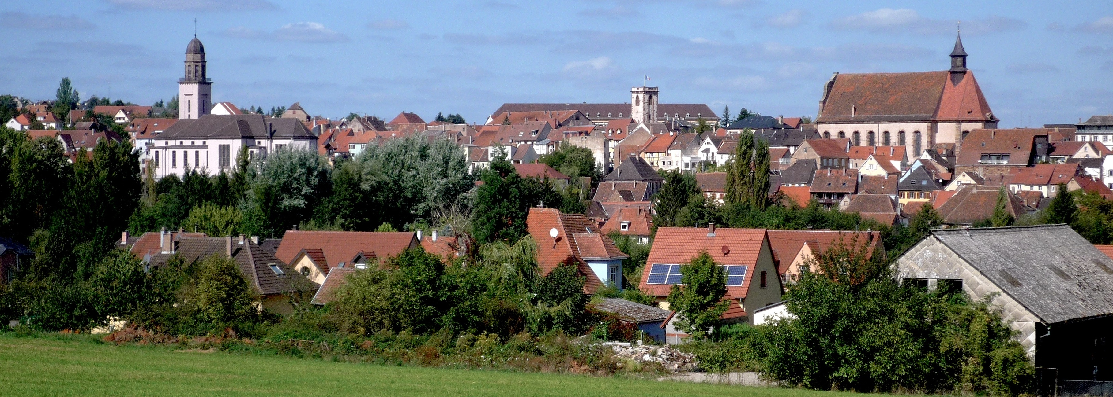 Wasselonne, panorama sur la ville, 2011.